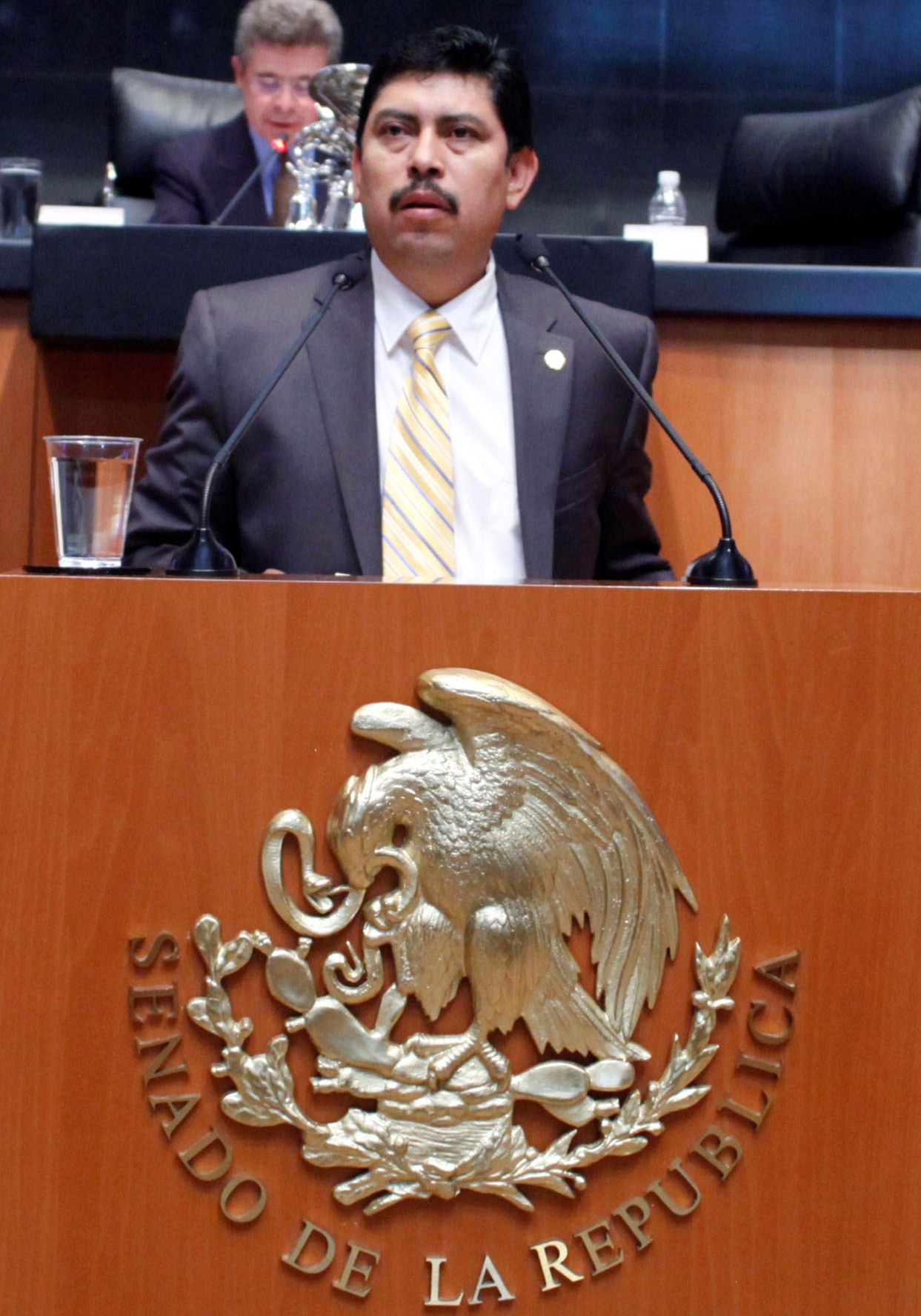 El Senador por Guerrero, Sofío Ramírez Hernández, en tribuna durante el primer periodo ordinario de la LXII Legislatura.